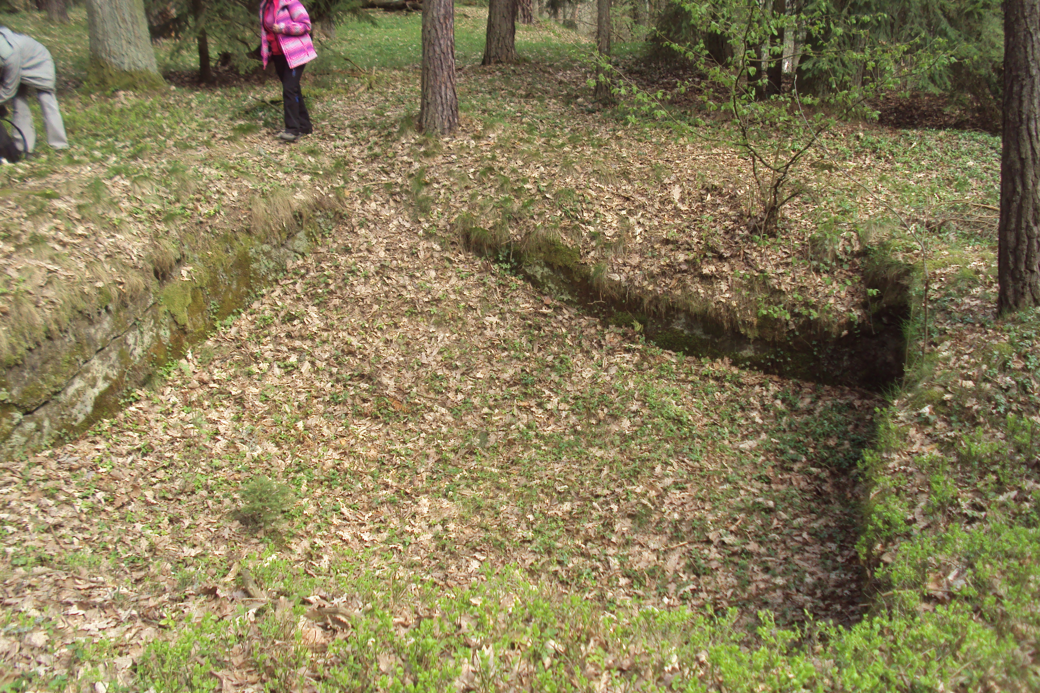 Pozůstatky hrádku Frýdlant